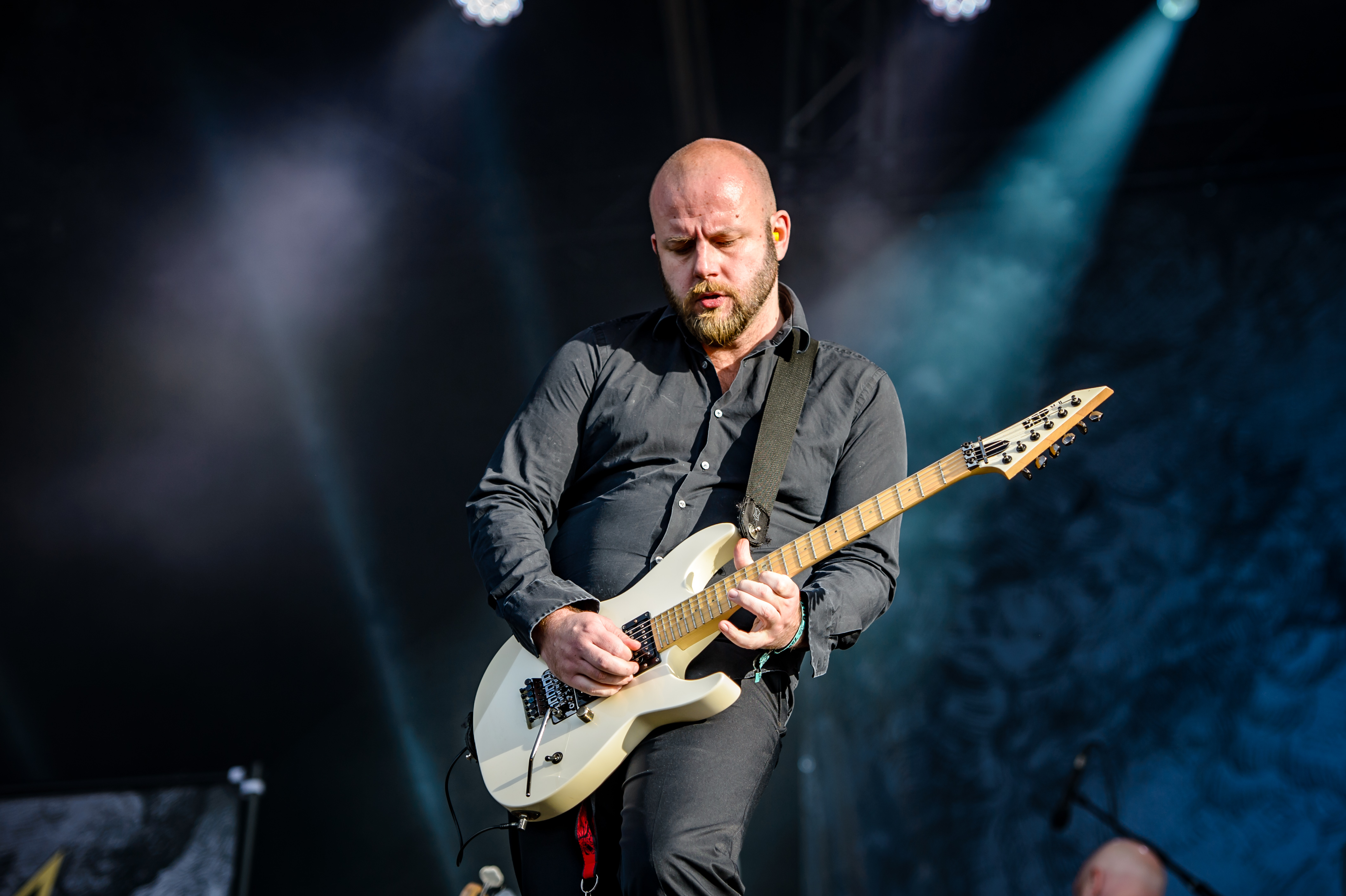 'RockHarz Open Air 2016; Ballenstedt': 'Soilwork'